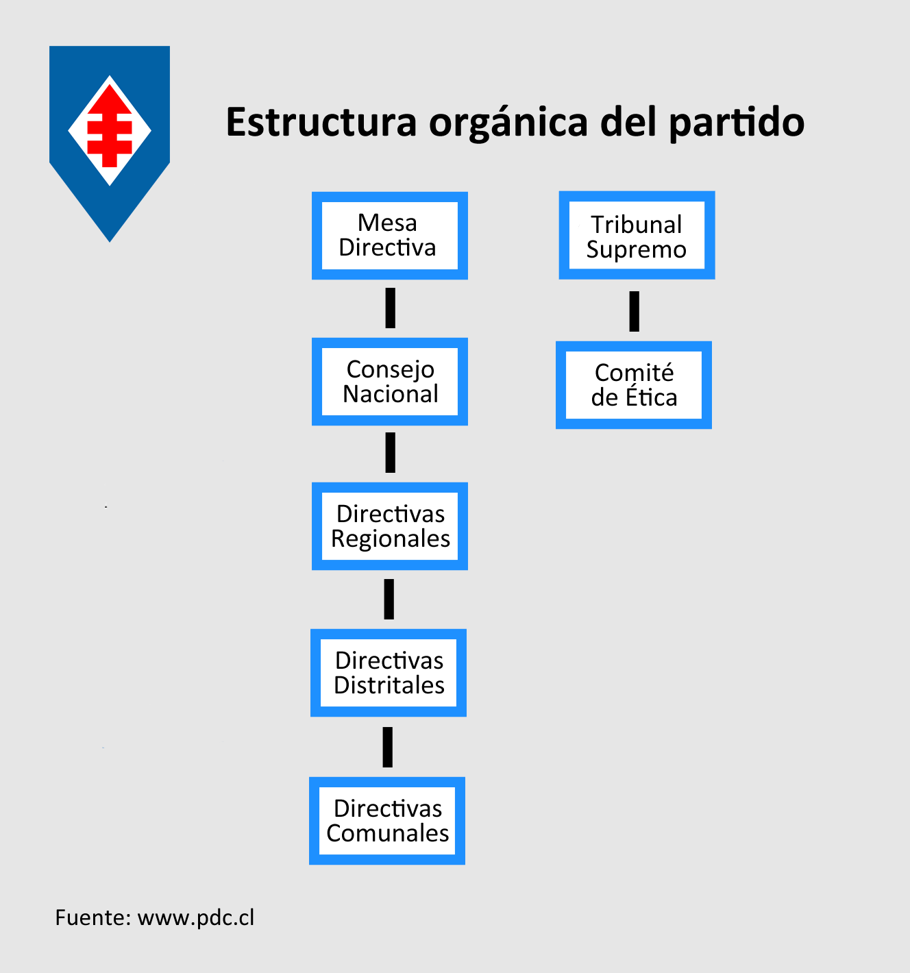 Organigrama con la estructura orgánica del Partido Demócrata Cristiano de Chile